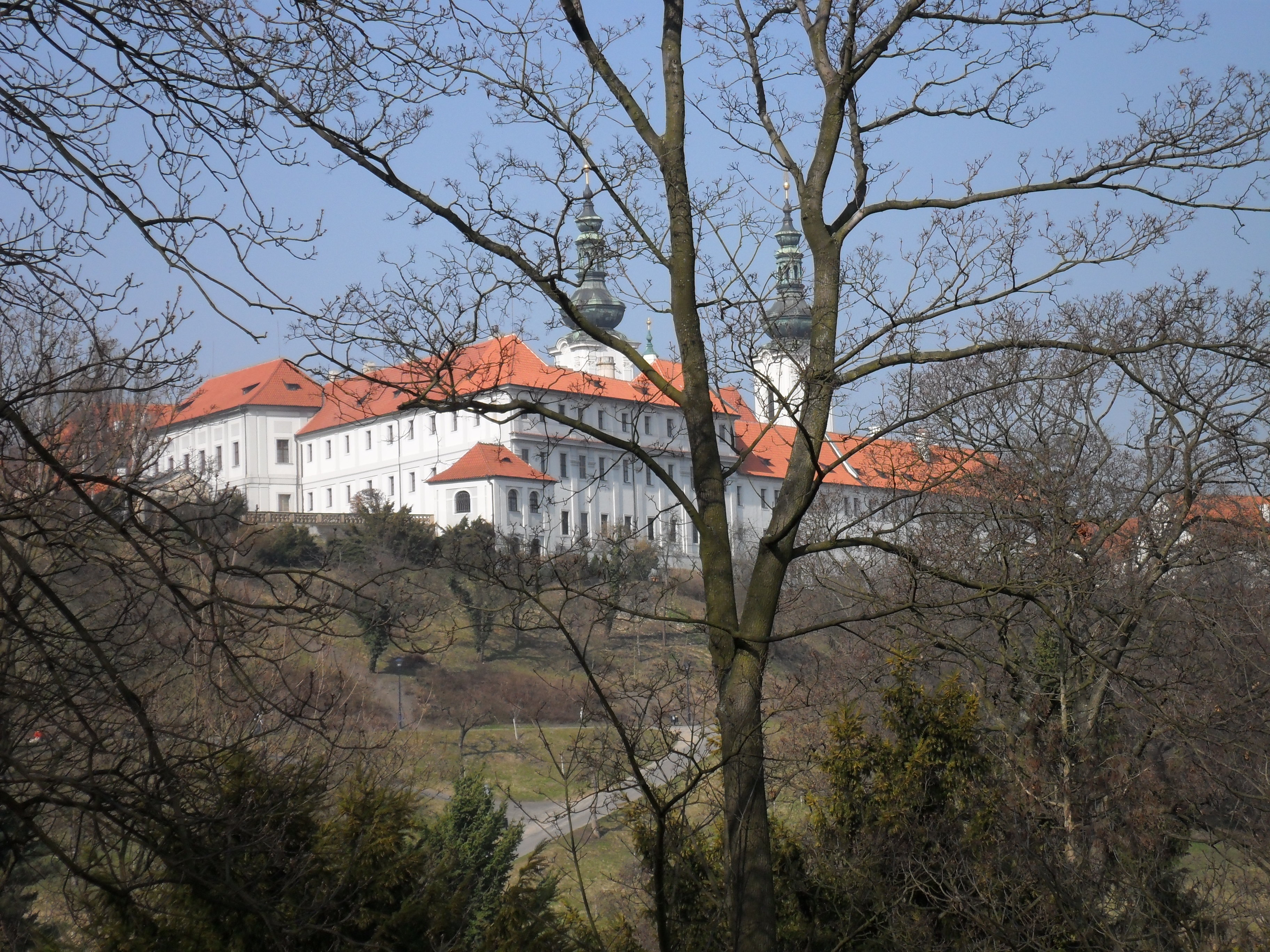 Vue sur le monastère de Strahov depuis le parc de Pétrin, au sud